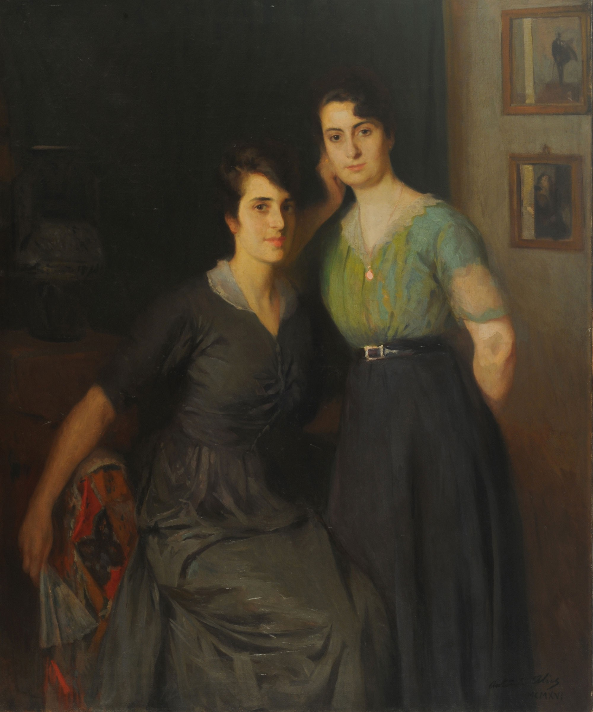 Antonio Alice, Mis hermanas. Siglo XIX. 145,5 x 121 cm, con marco: 175 x 148 x 12,5 x 13 cm, óleo sobre tela. Inv. 8462.